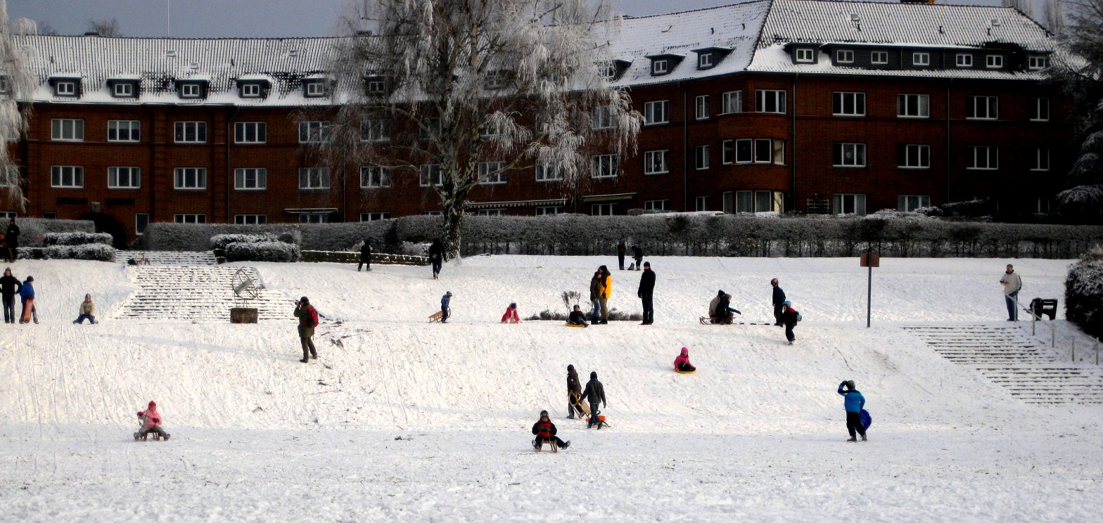 Tor der Hoffnung im Winter, Südflügel